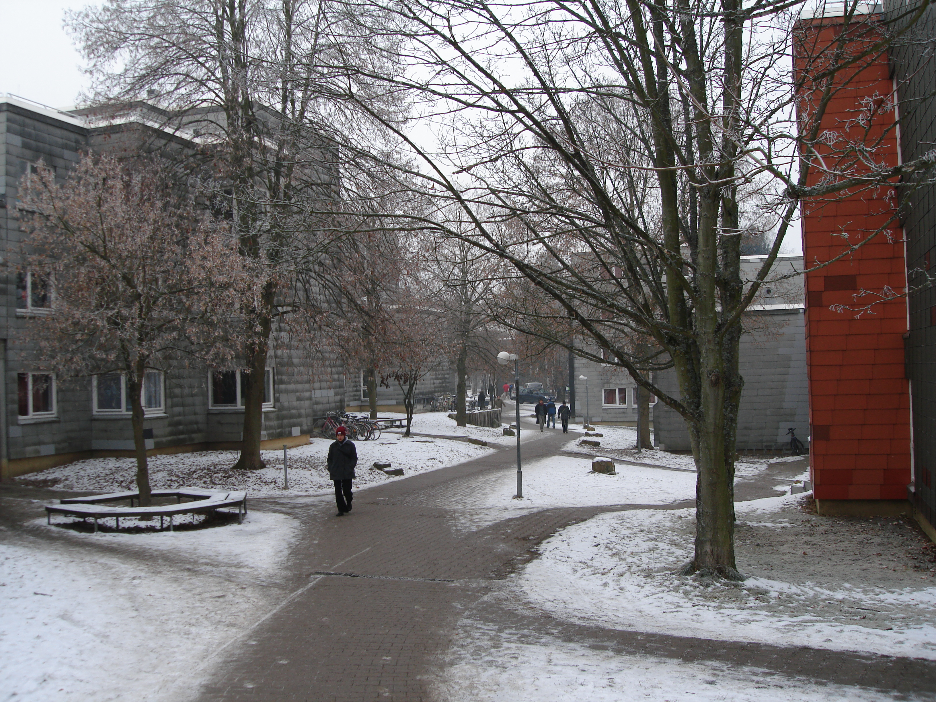 Studentenwohnheime "Allmandring I", Universität Stuttgart, Vaihingen date: 03.02.2006 by: Christoph Hoffmann